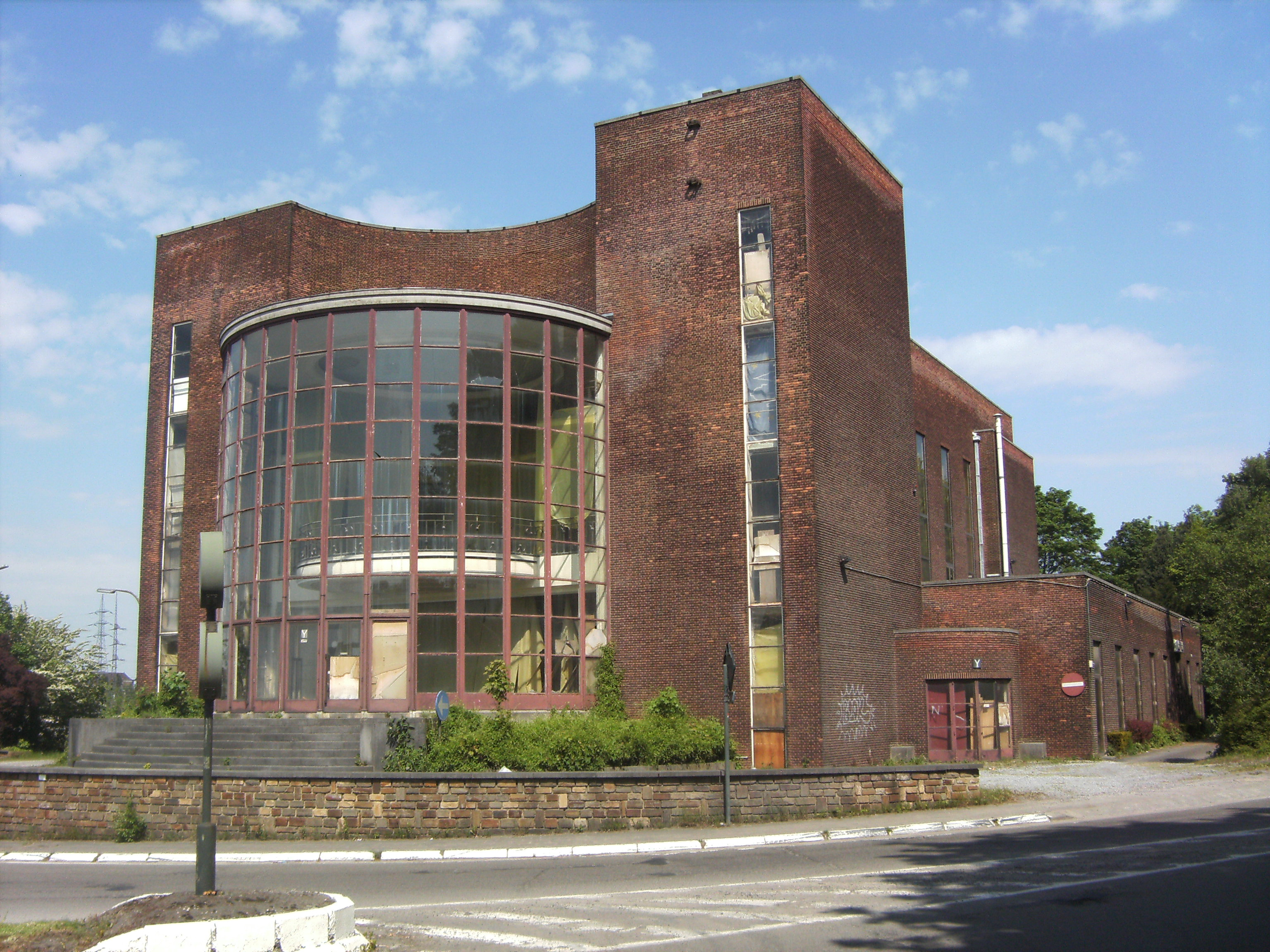 Couillet (Charleroi-Belgique) - Amicale Solvay.